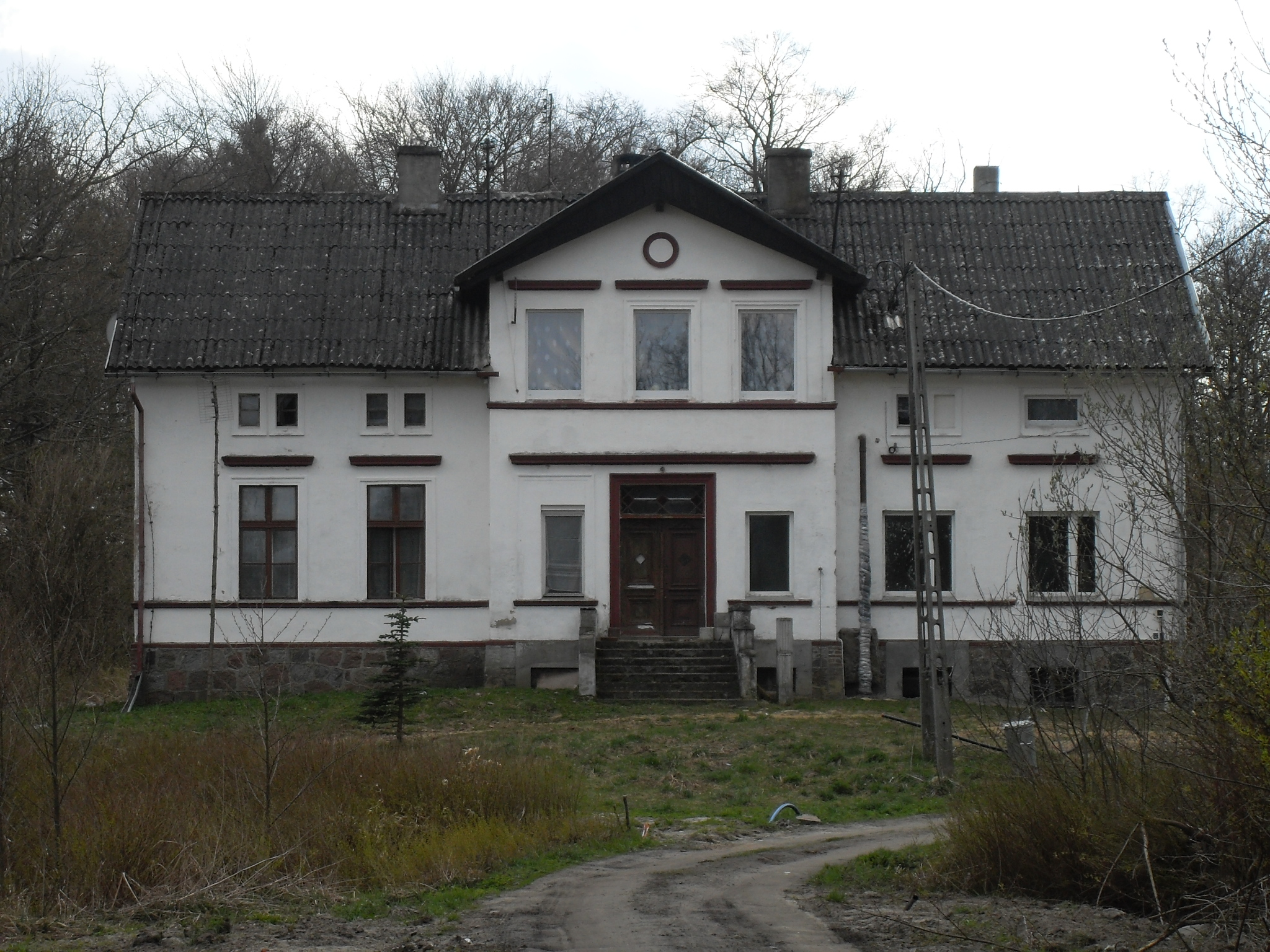 Bukowo - dwór